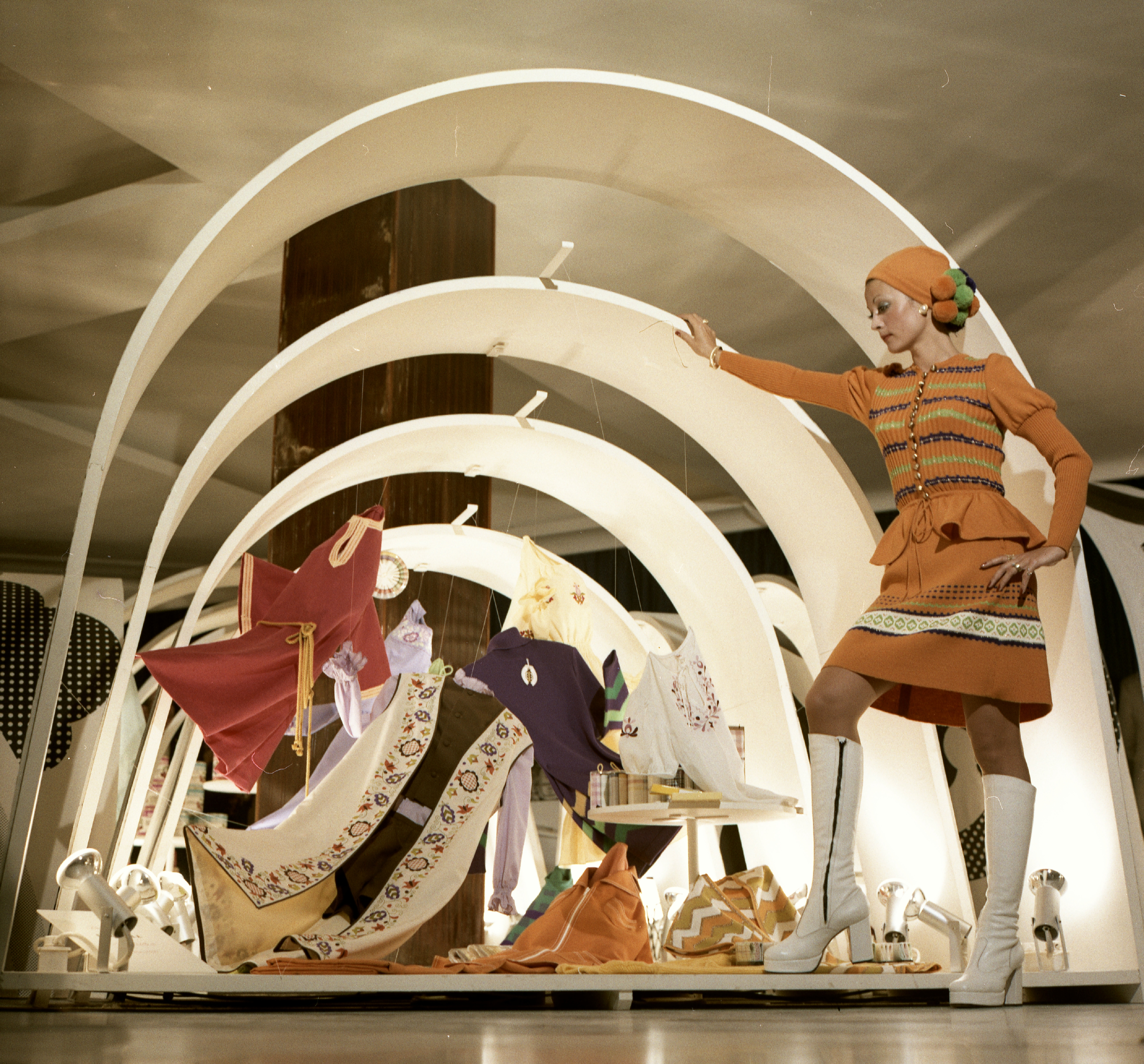 Csató Mari manöken. Tags: colorful, fashion, exhibition, boots Title: Csató Mari manöken.